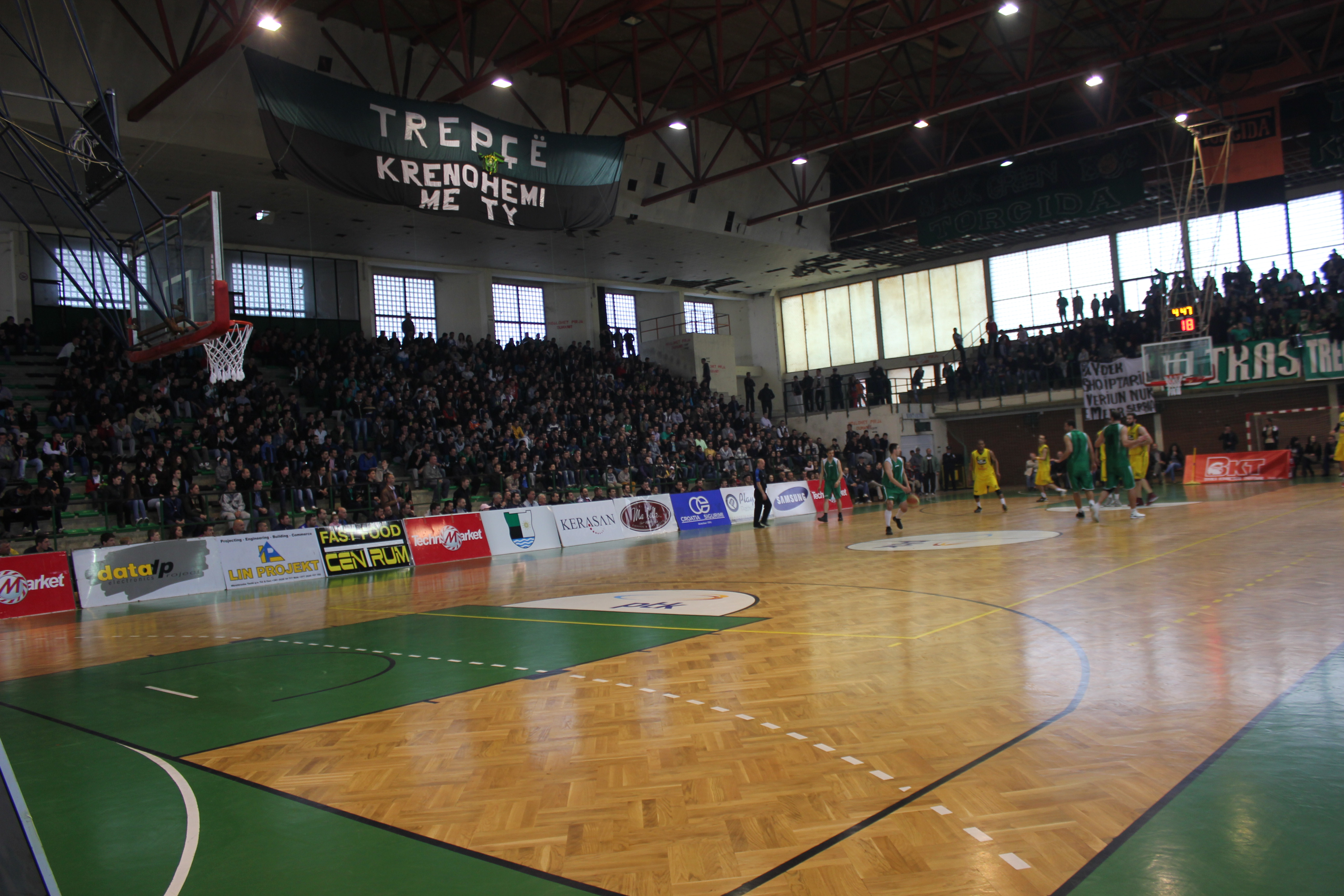 Pamje nga palestra 'Minatori' ku skuadra basketbollistike nga Mitrovica, Trepça i luan lojërat si vendas.